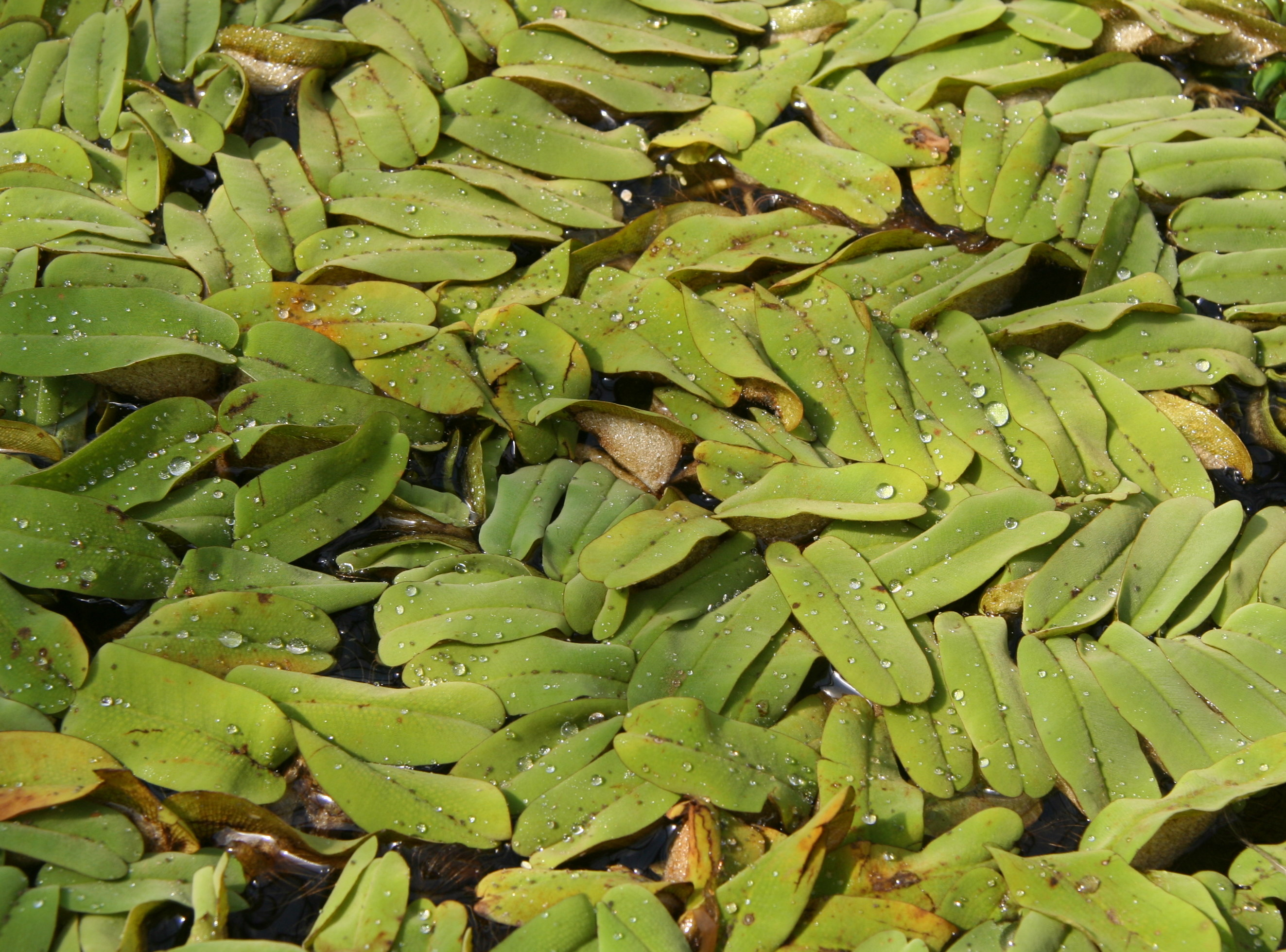 Salvinia oblongifolia im Botanischen Garten Dresden